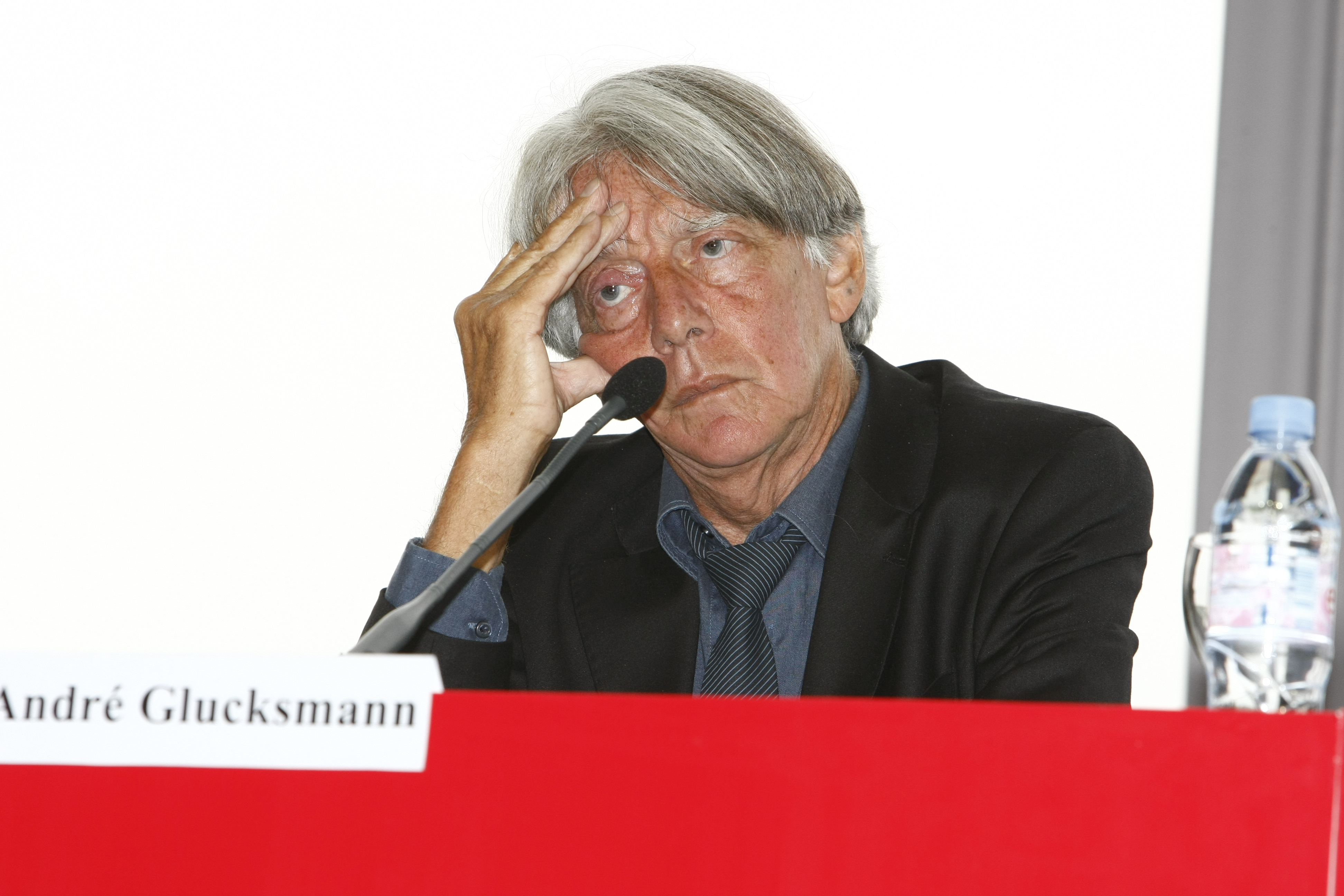 Splendeur du non, grandeur du oui